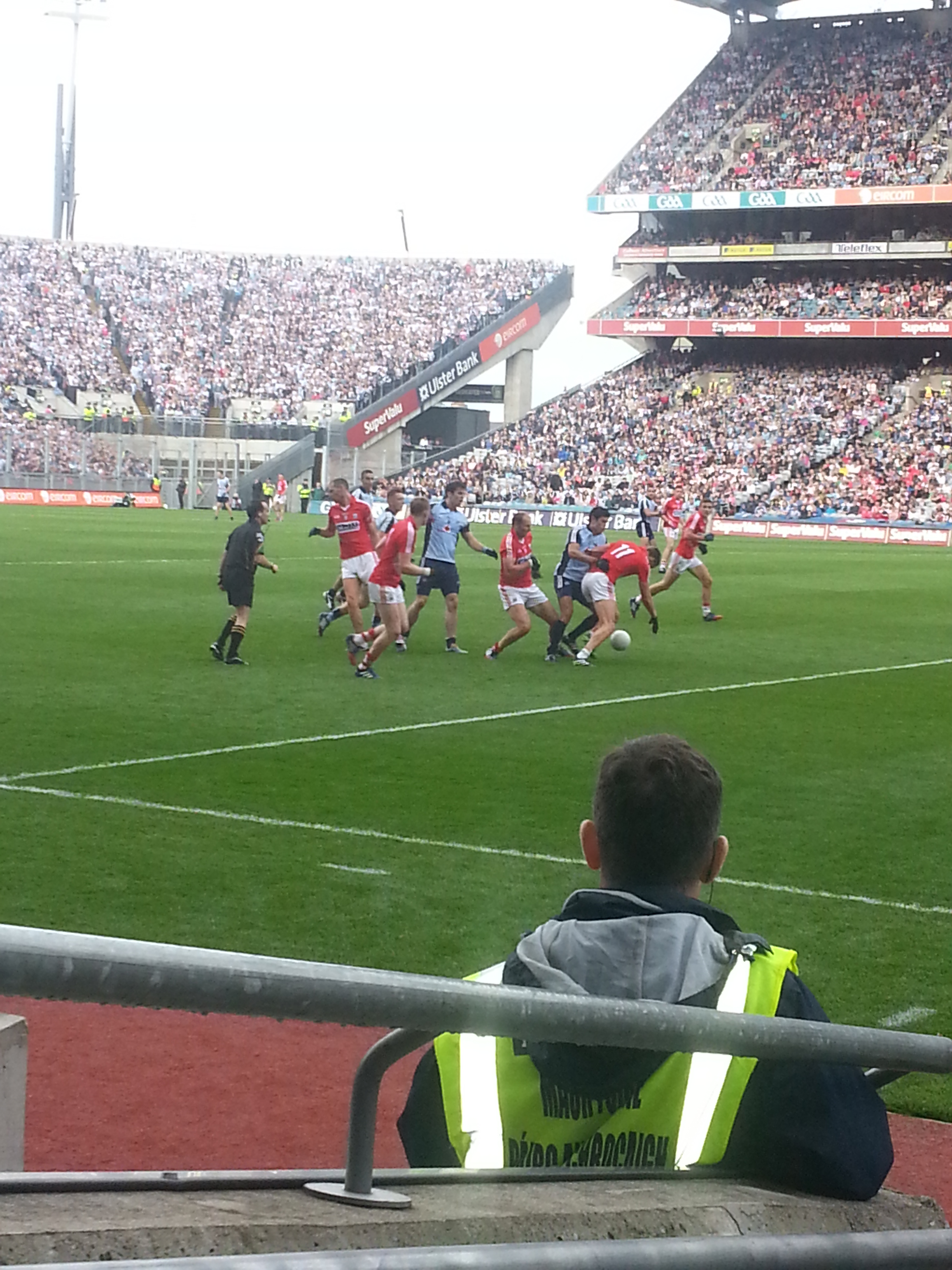 Action du match Cork-Dublin (quart de finale du All-Ireland 2013)